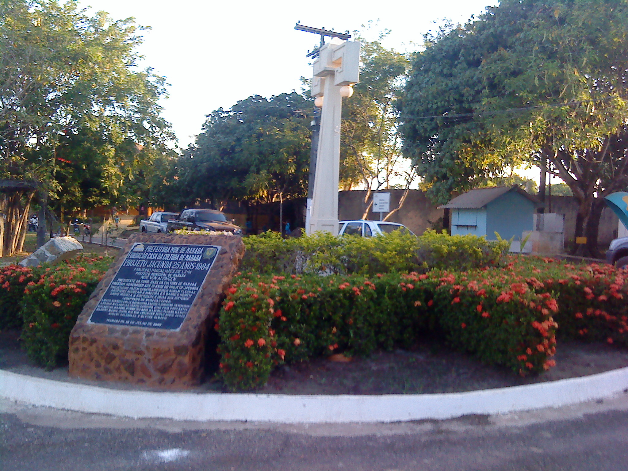 Monumento ao "Projeto Jacundá" na Fundação Casa da Cultura de Marabá (FCCM).